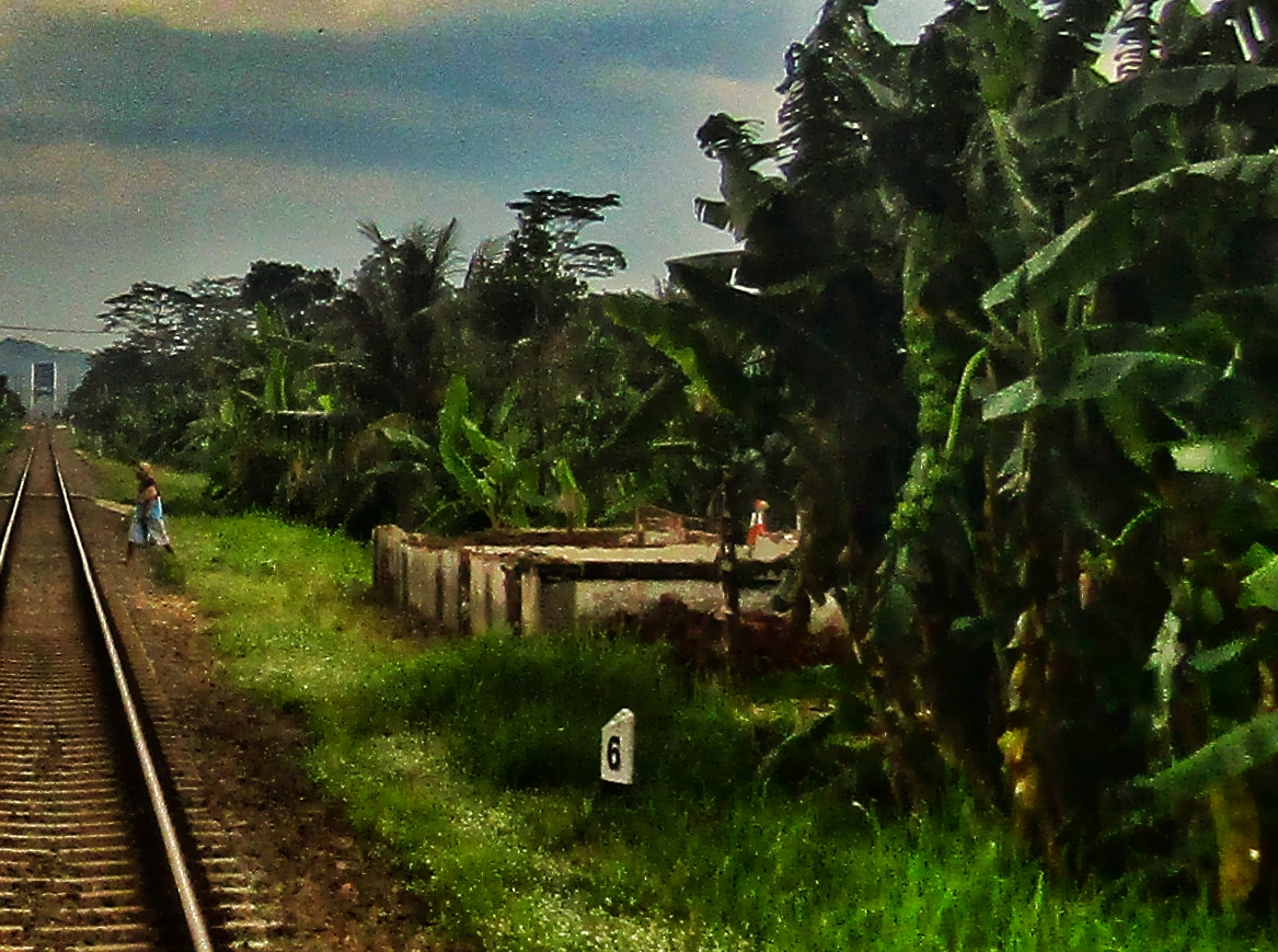 Bangunan utama Halte Cikawung, dibongkar per 2020